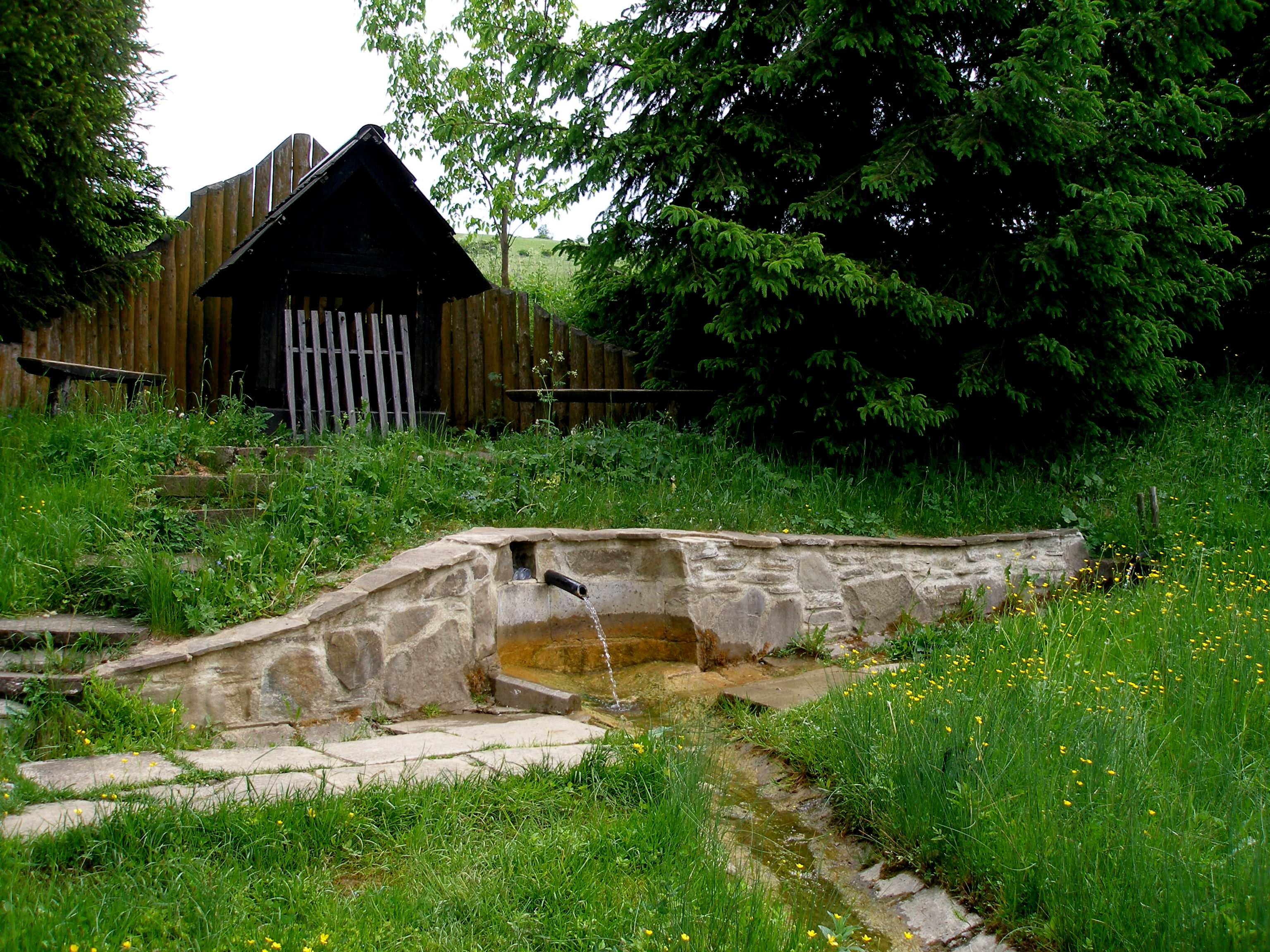 Obec Vysoká okres Sabinov